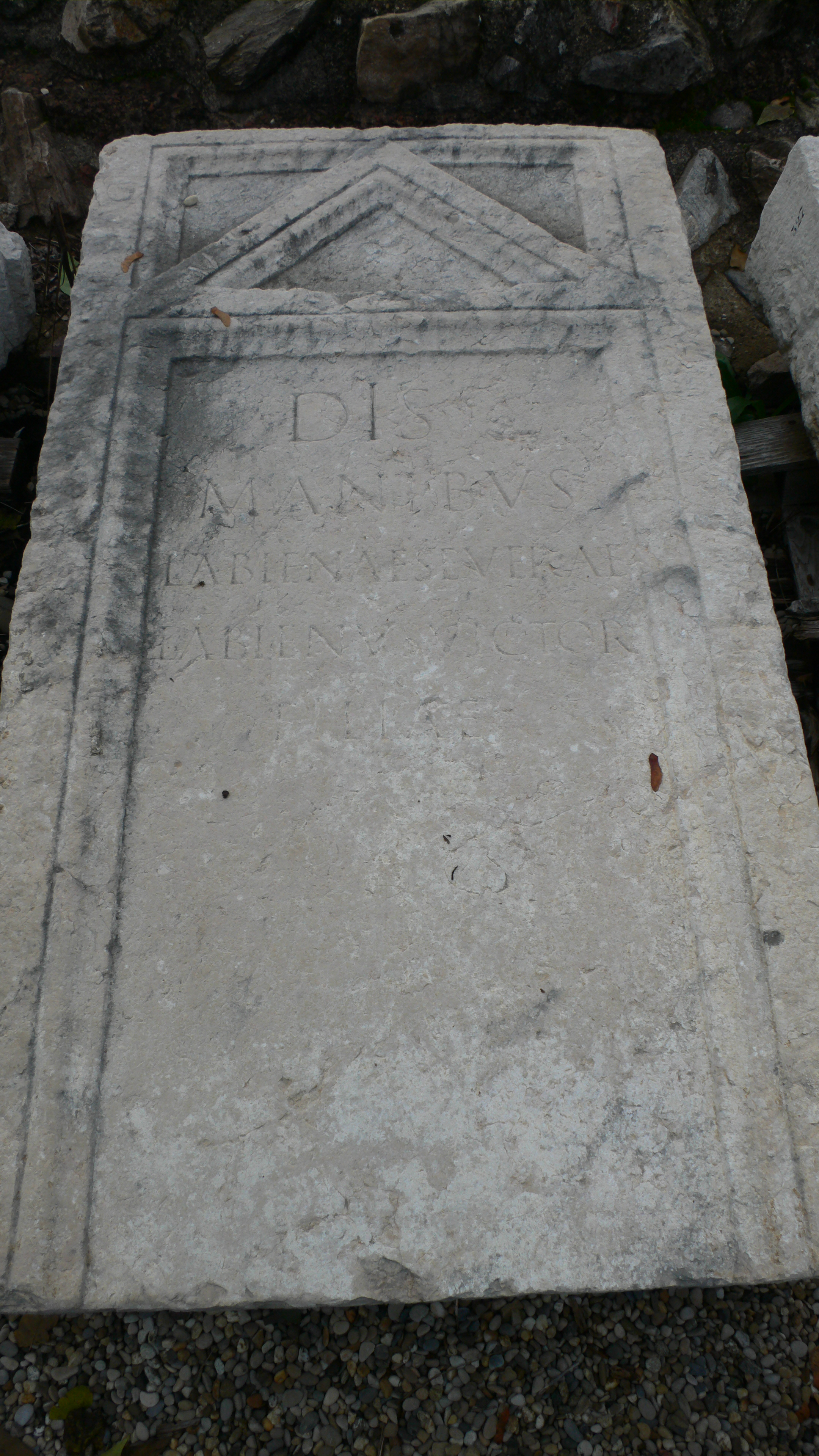 Musée gallo-romain de Fourvière (Lyon) - Jardin archéologique du théâtre antique de Lyon - Une stèle retrouvé aux Génovéfains à fronton triangulaire : Dis Manibus / Labienae Severae, / Labienus Victor, filiae : Aux dieux Mânes de Labiena Severa, Labienus Victor à sa fille.